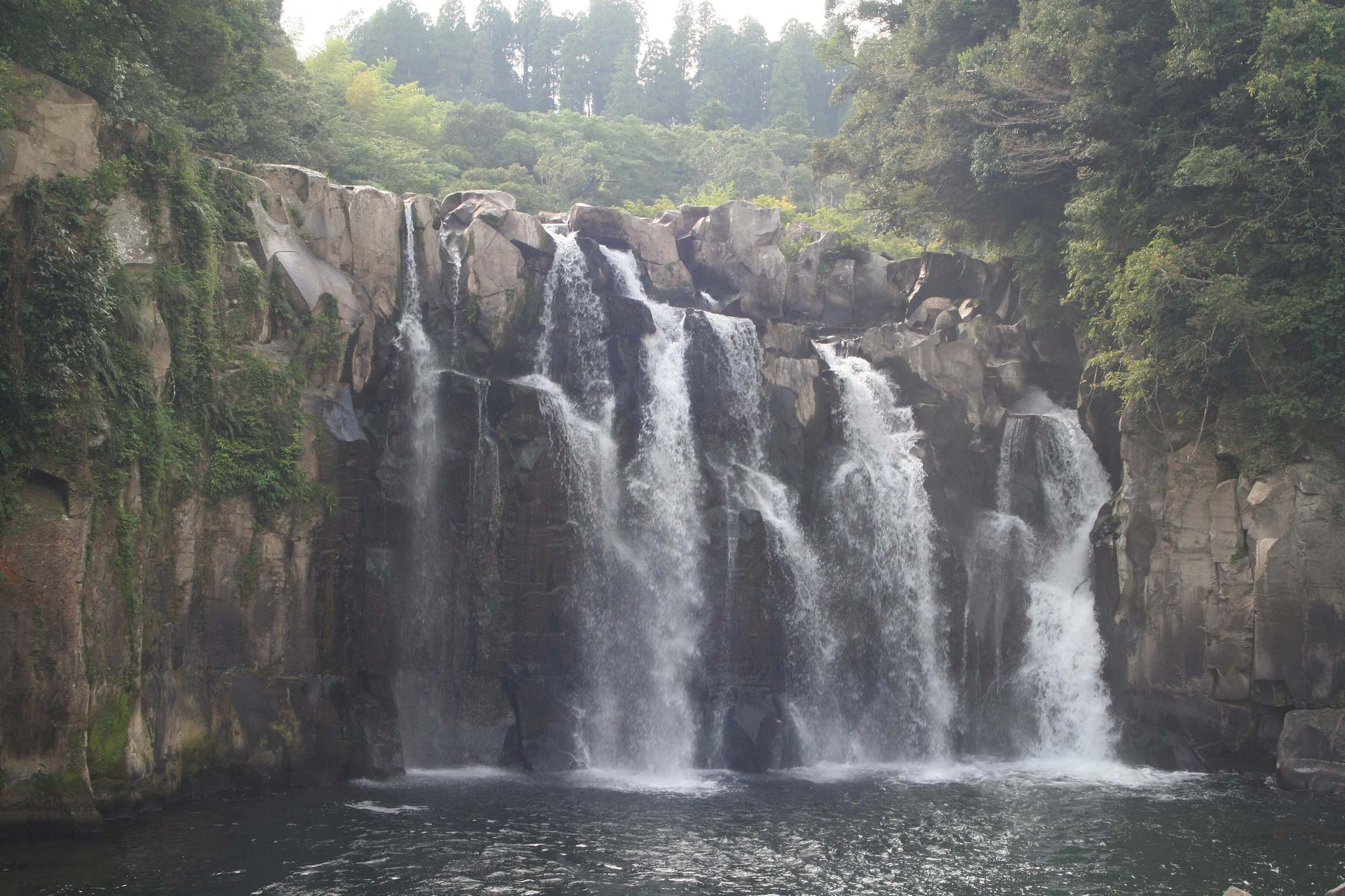 関之尾滝 宮崎県都城市